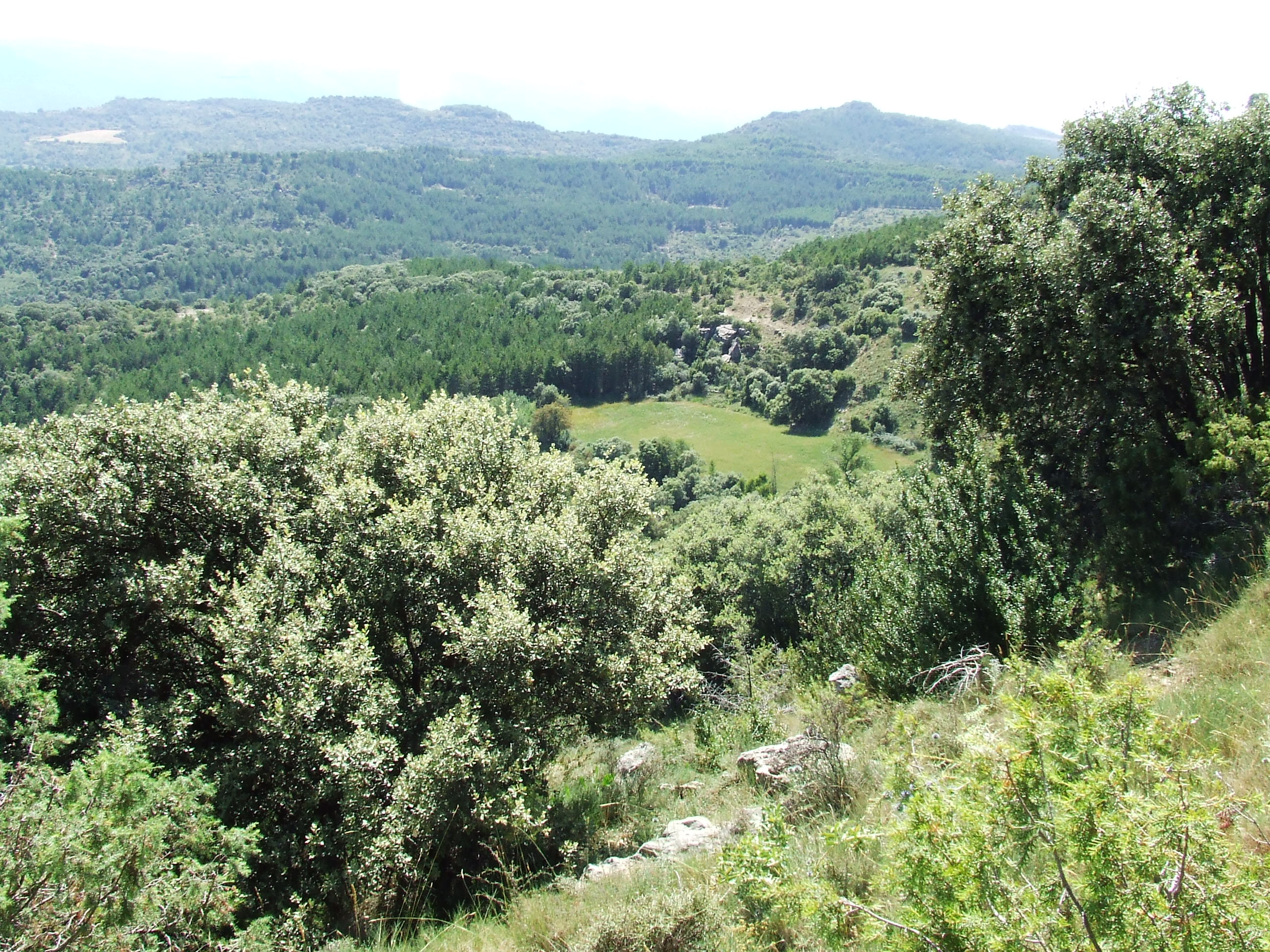 Tros de Farmicó (Miravet, Mur, Castell de Mur, Pallars Jussà)